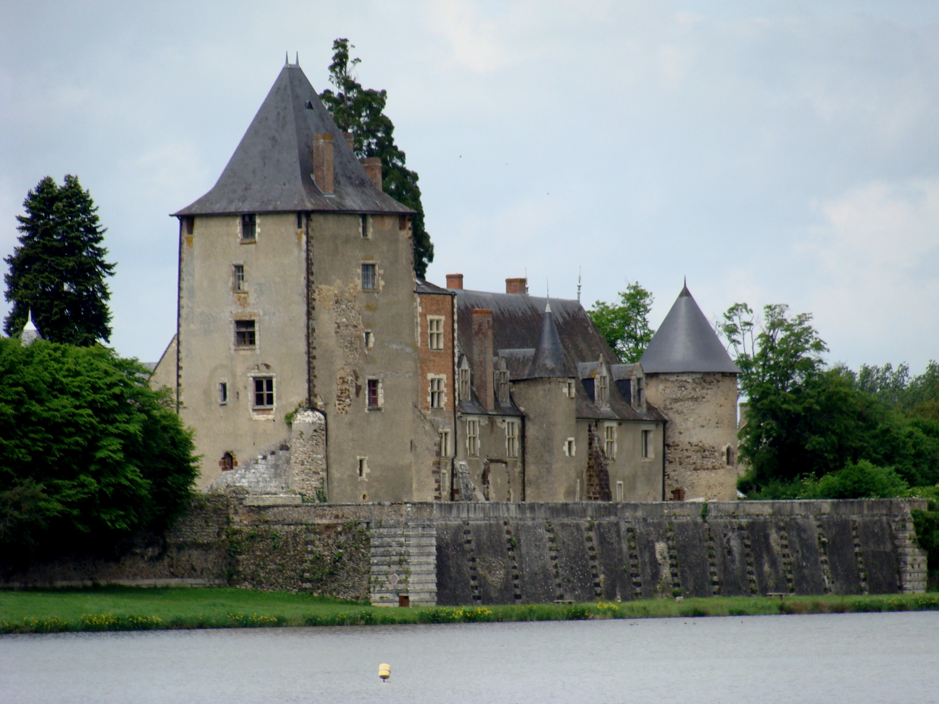 Château de Béthune, La Chapelle-d'Angillon (Cher, France). Façade Sud. Le donjon carré à six étages (XIe s.), les logis et une des trois tours d’angle (XVe s.). .